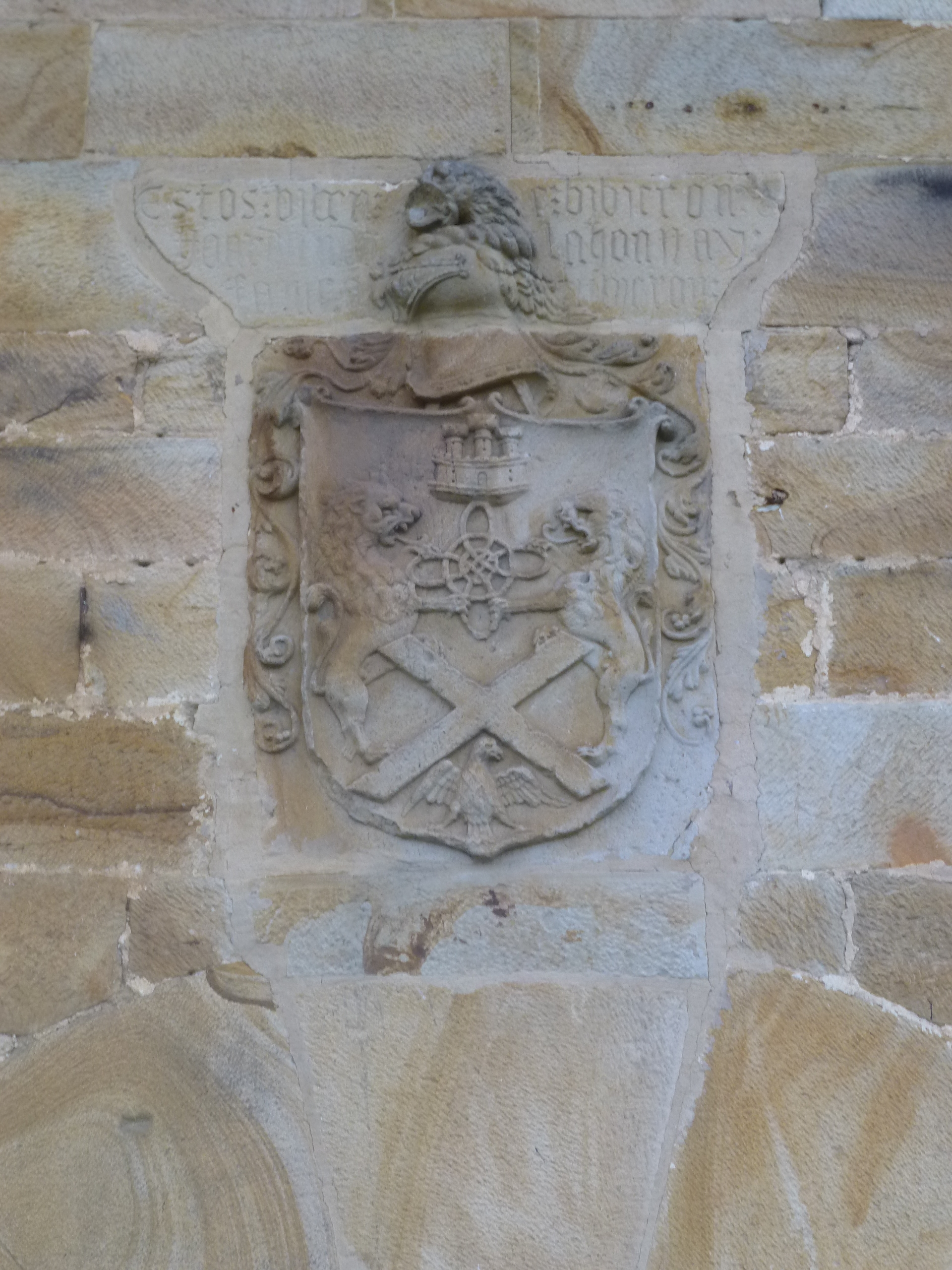 Casa Torre de Mutsaratz del siglo IX. Escudo de armas de la torre de Mutzaratz en Abadiano , Vizcaya, País Vaco, España.